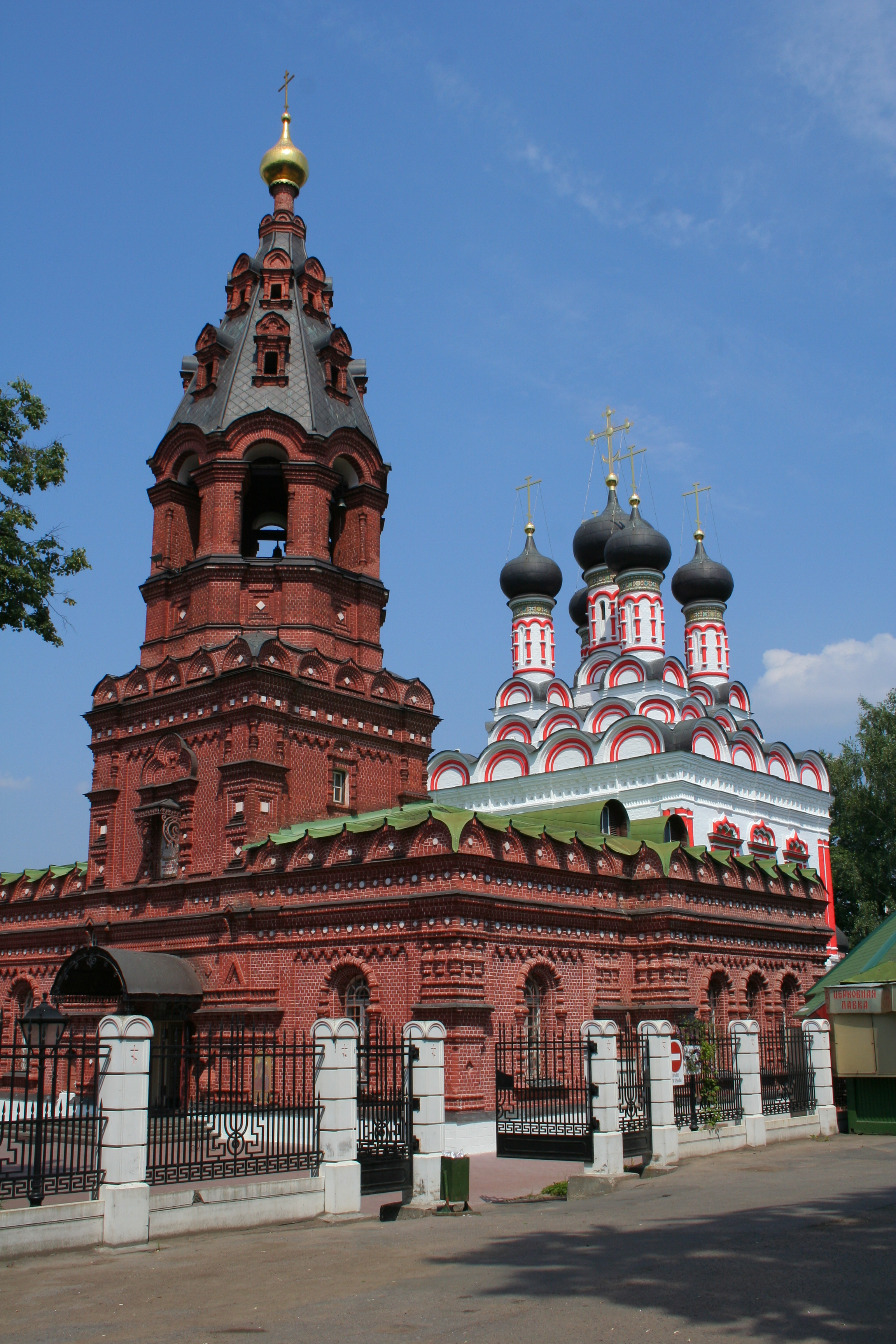 Friedhofskirche des Kunzewoer Friedhofs, Moskau